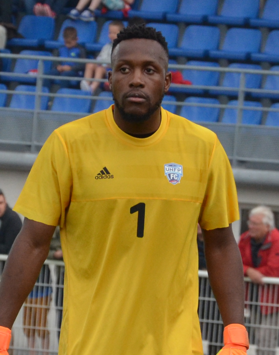 Photographie prise lors du match opposant le SM Caen à l'UNFP en match amical au stade Louis-Villemer de Saint-Lô le 30 juillet 2016. Ici, Anthony Mfa.